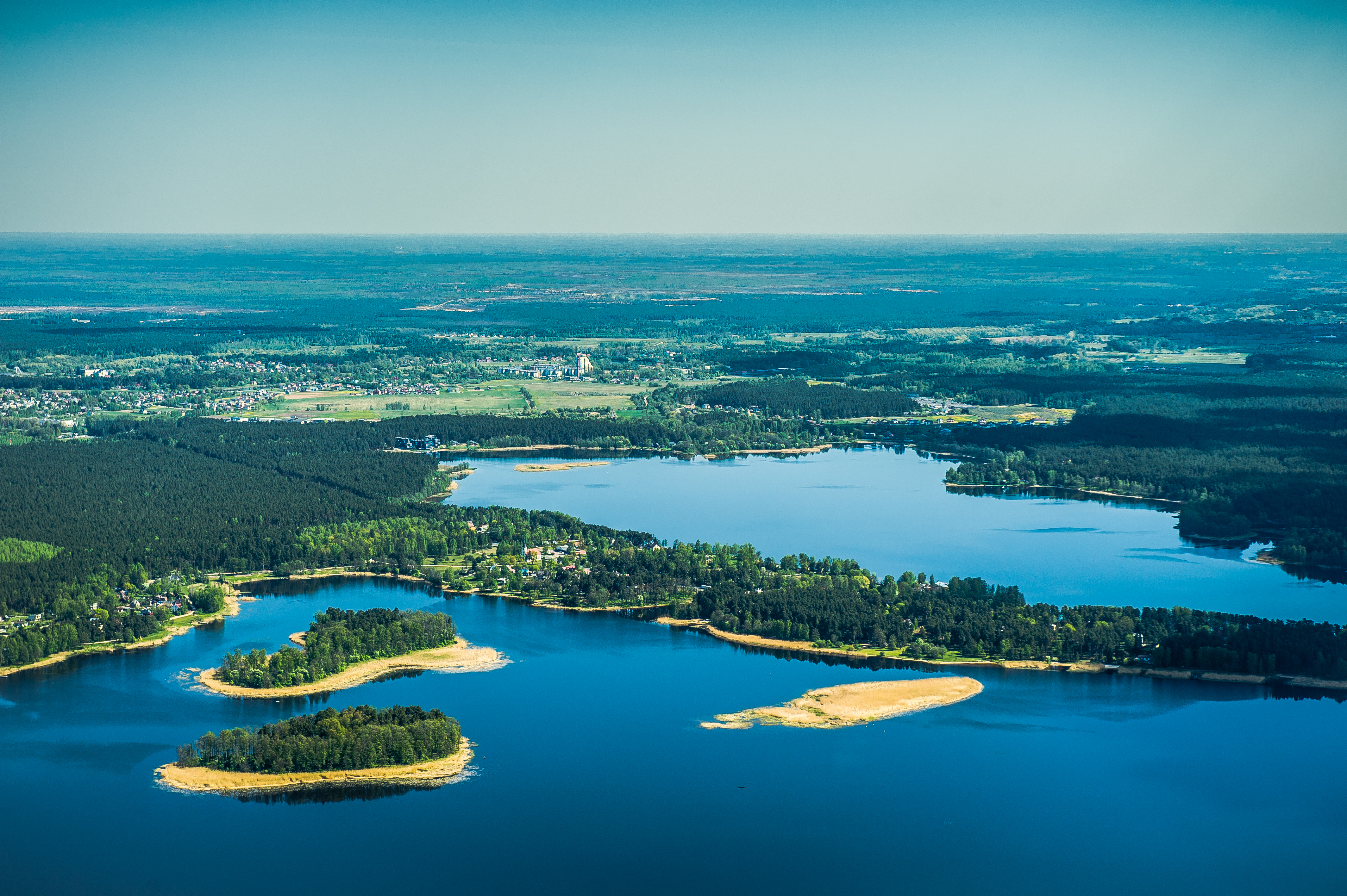 Baltezers